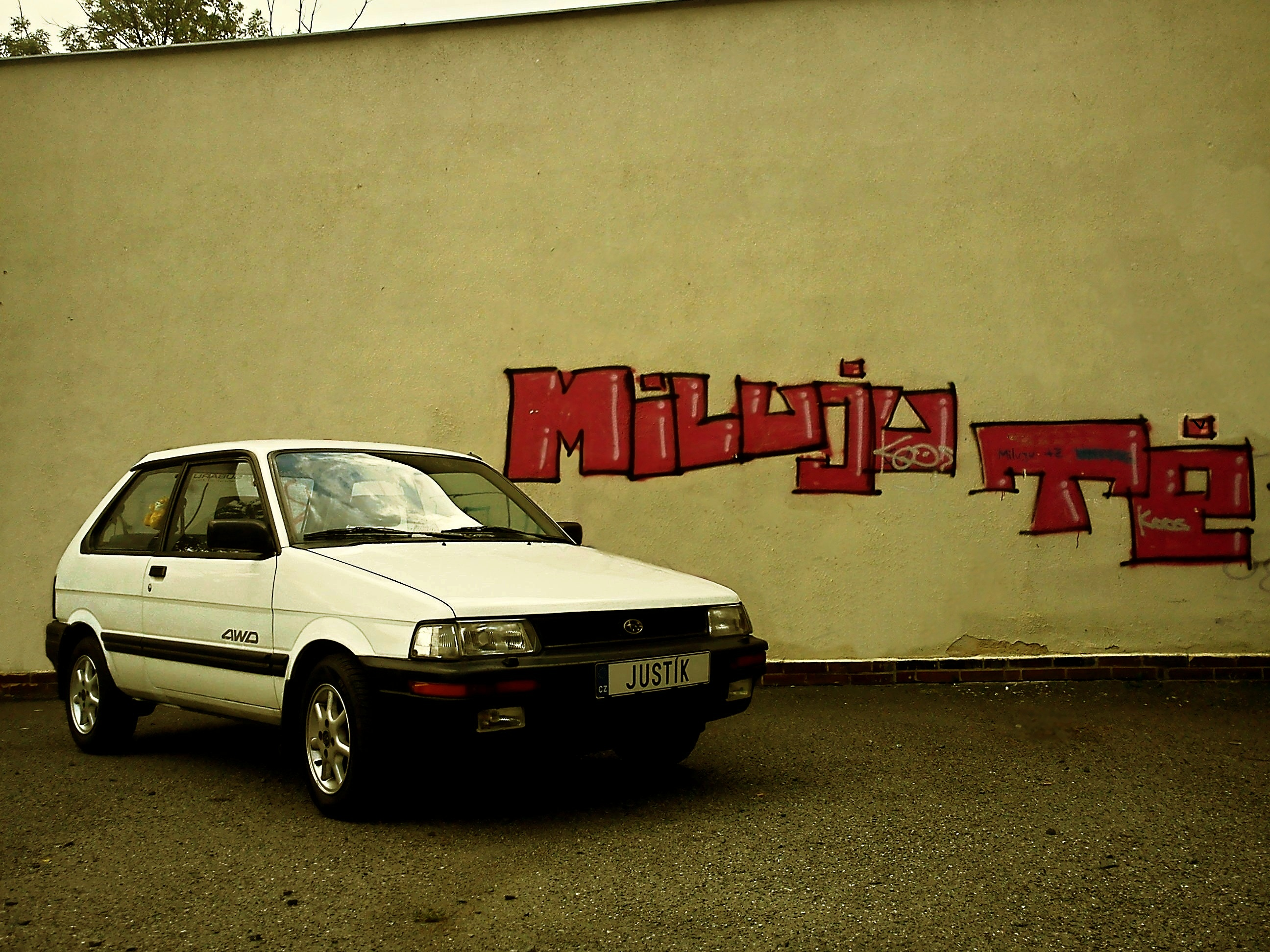 středočeský kraj